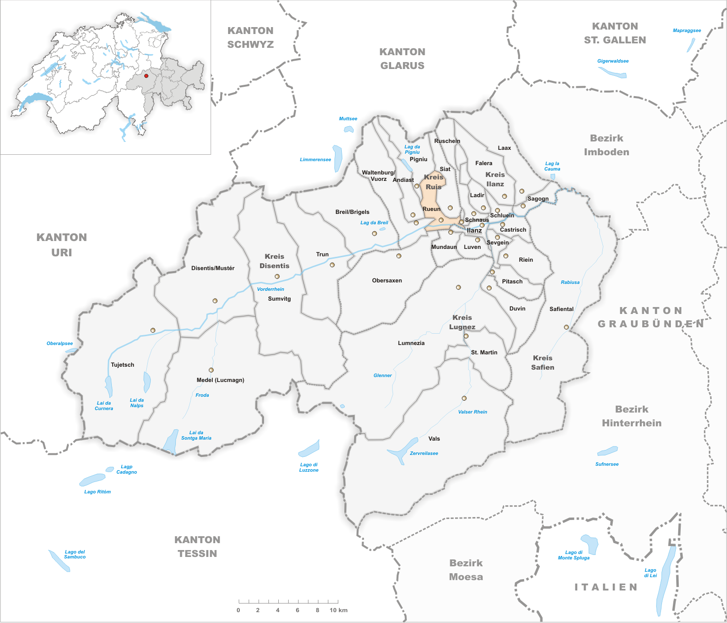 Municipality Rueun